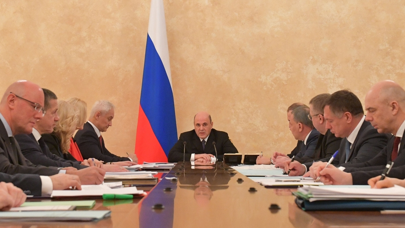 Совещание с вице-премьерами